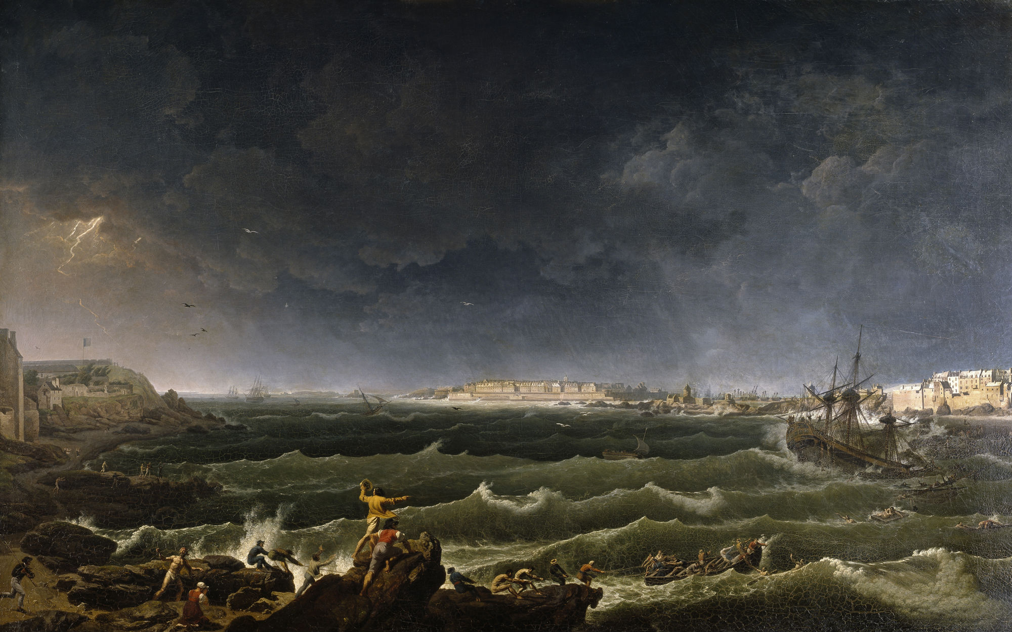 Scène de tempête et de naufrage vue de la rade et du port de Saint-Malo, prise de l'anse des Sablons à Saint-Servan. Dernier quart du XVIIIème siècle.